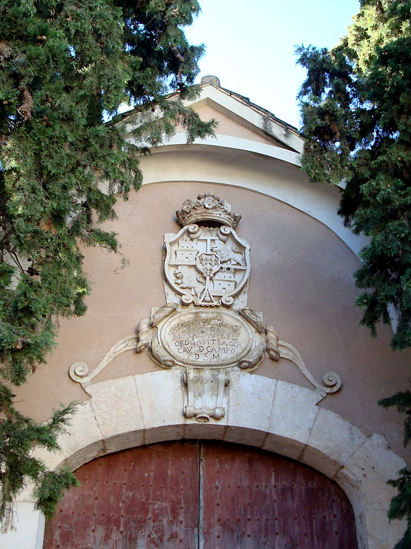 Brihuega